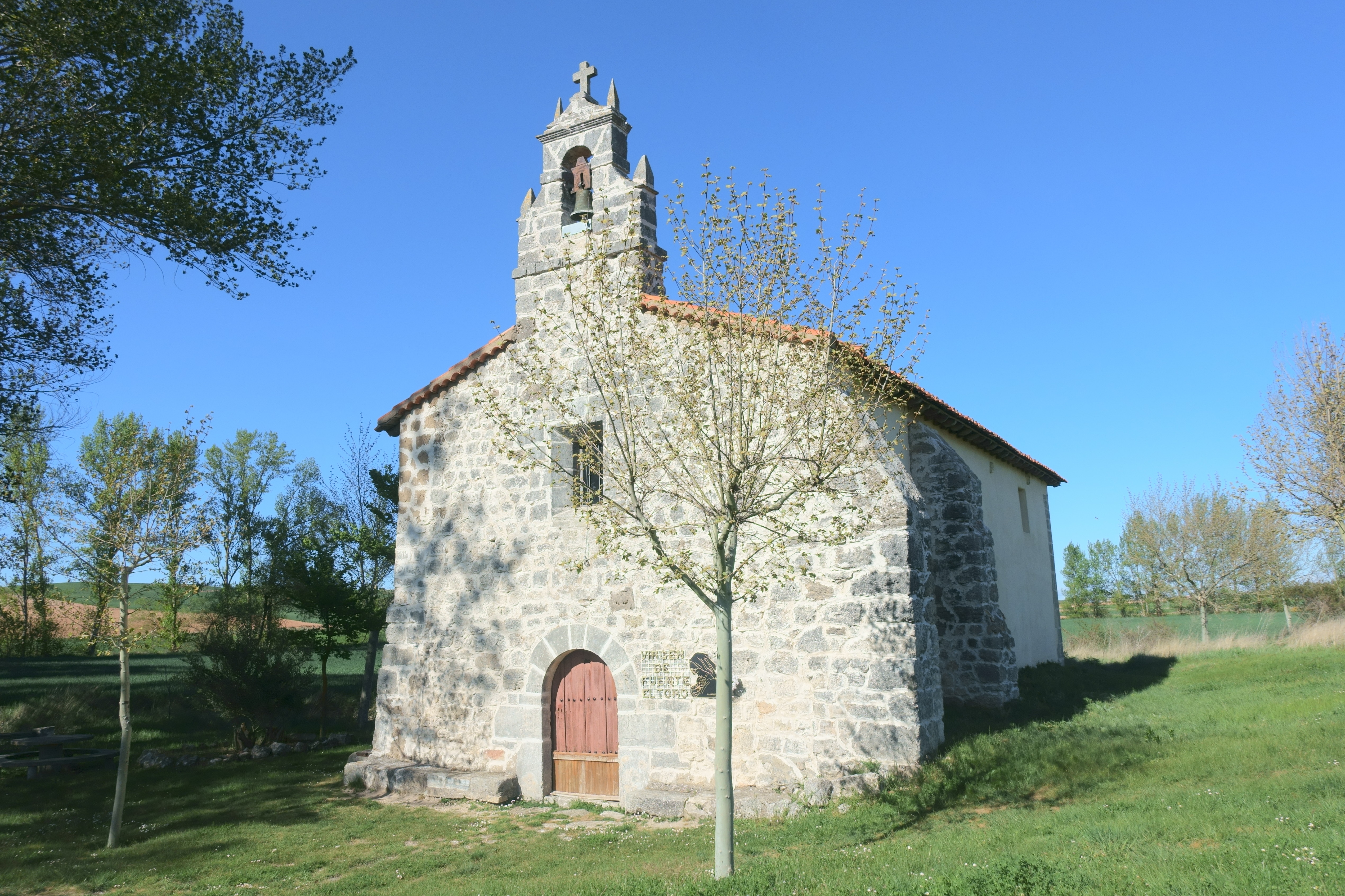 Ermita de Fuenteltoro, Villangómez (Burgos, España).